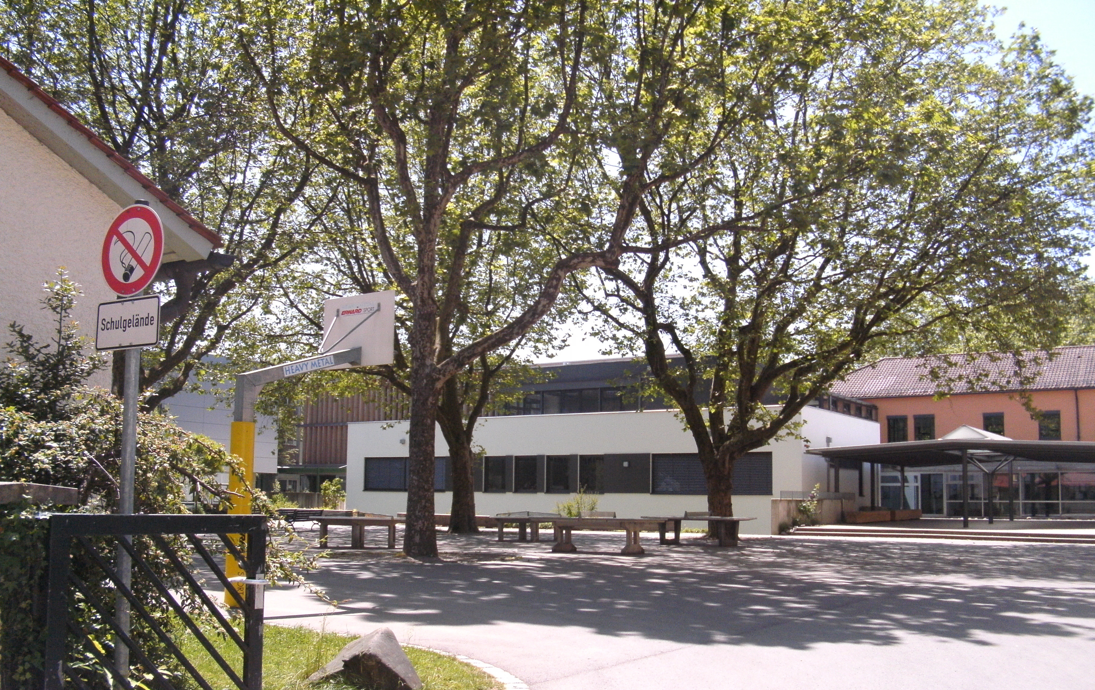 Pausenhof des Rupert-Neß-Gymnasiums in Wangen im Allgäu